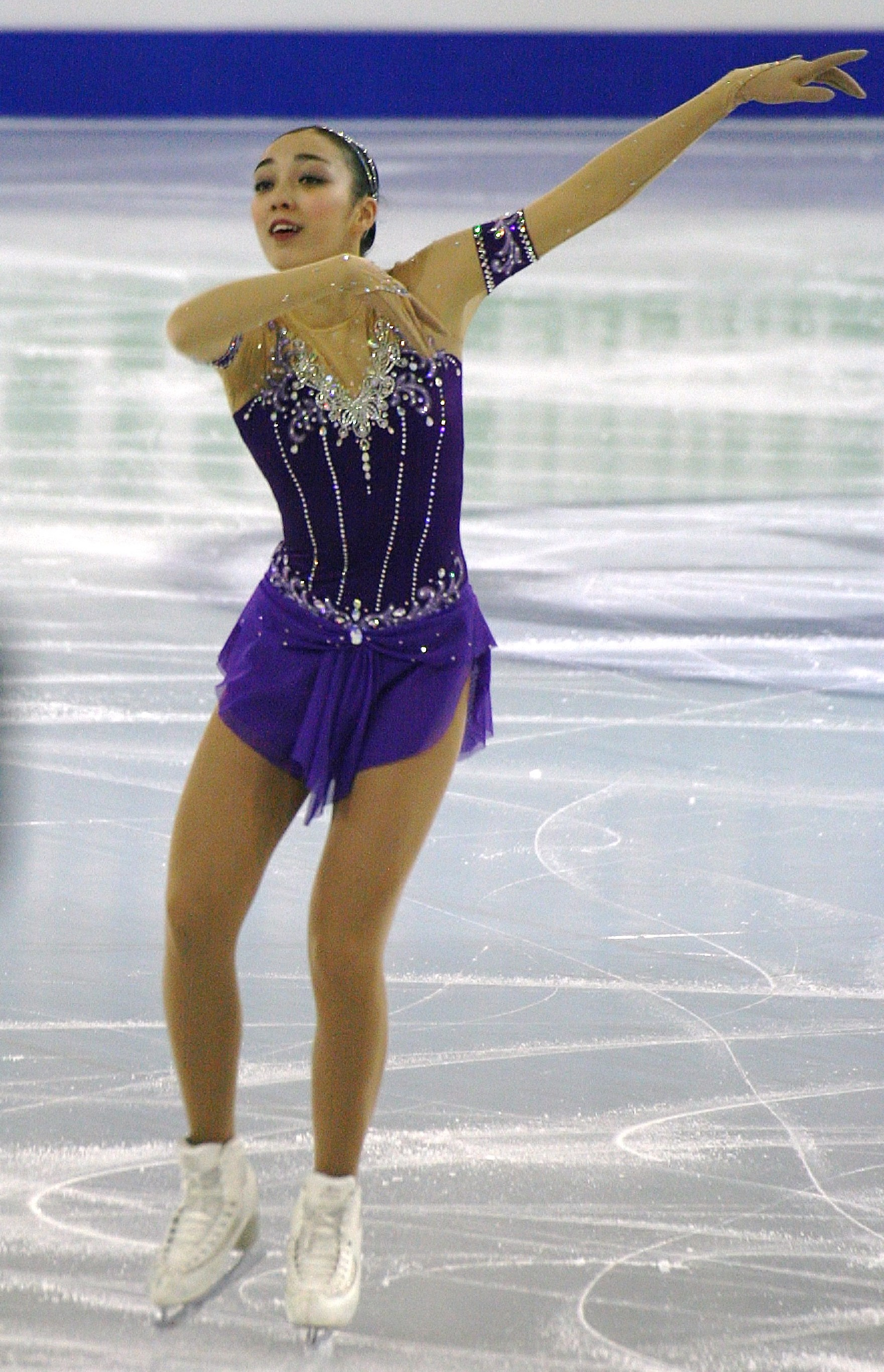 Рика Хонго (Япония)ина финале Гран-при по фигурному катанию 2014-2015. Короткая программа.